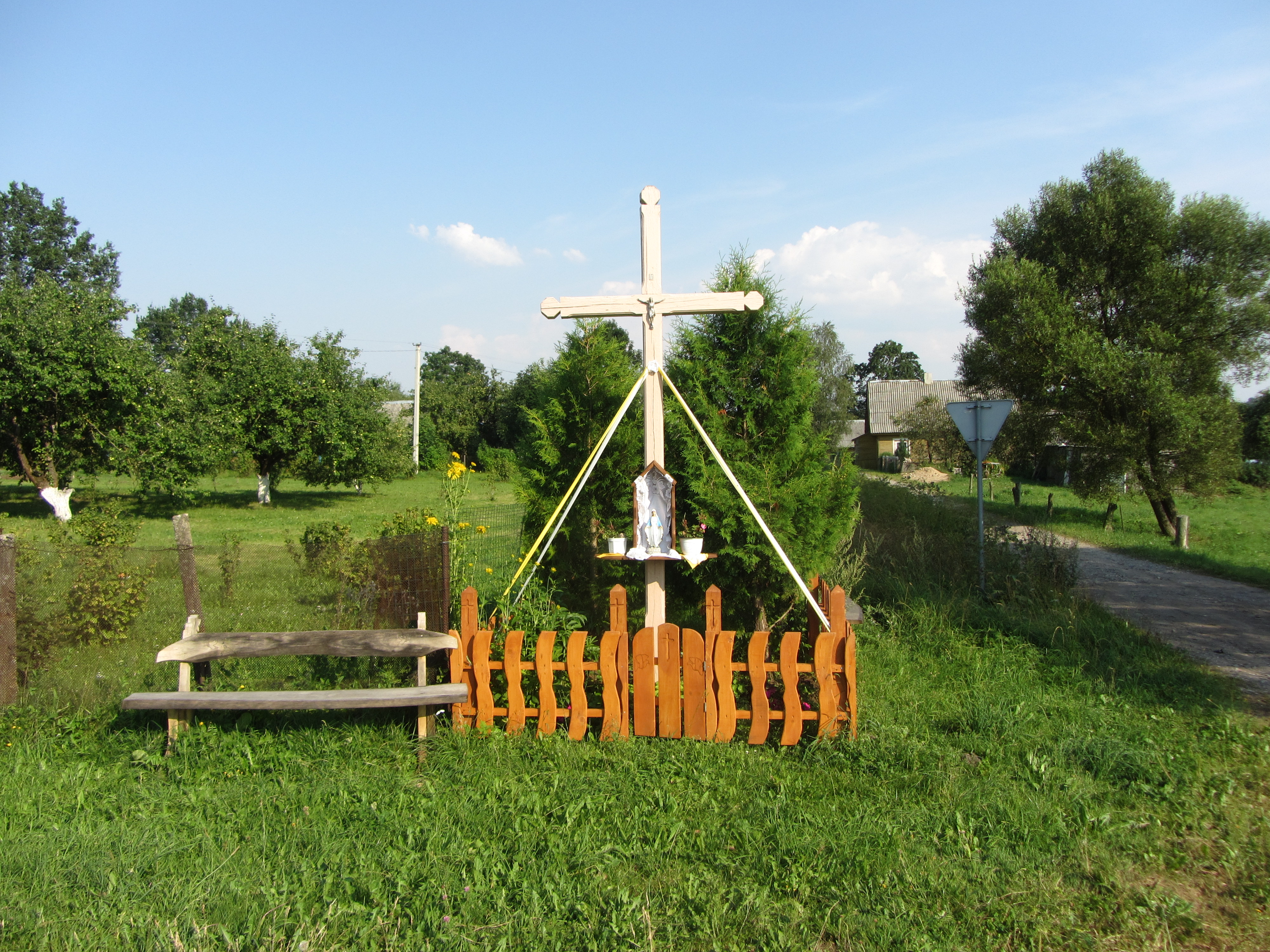 Padvarionys, Lithuania